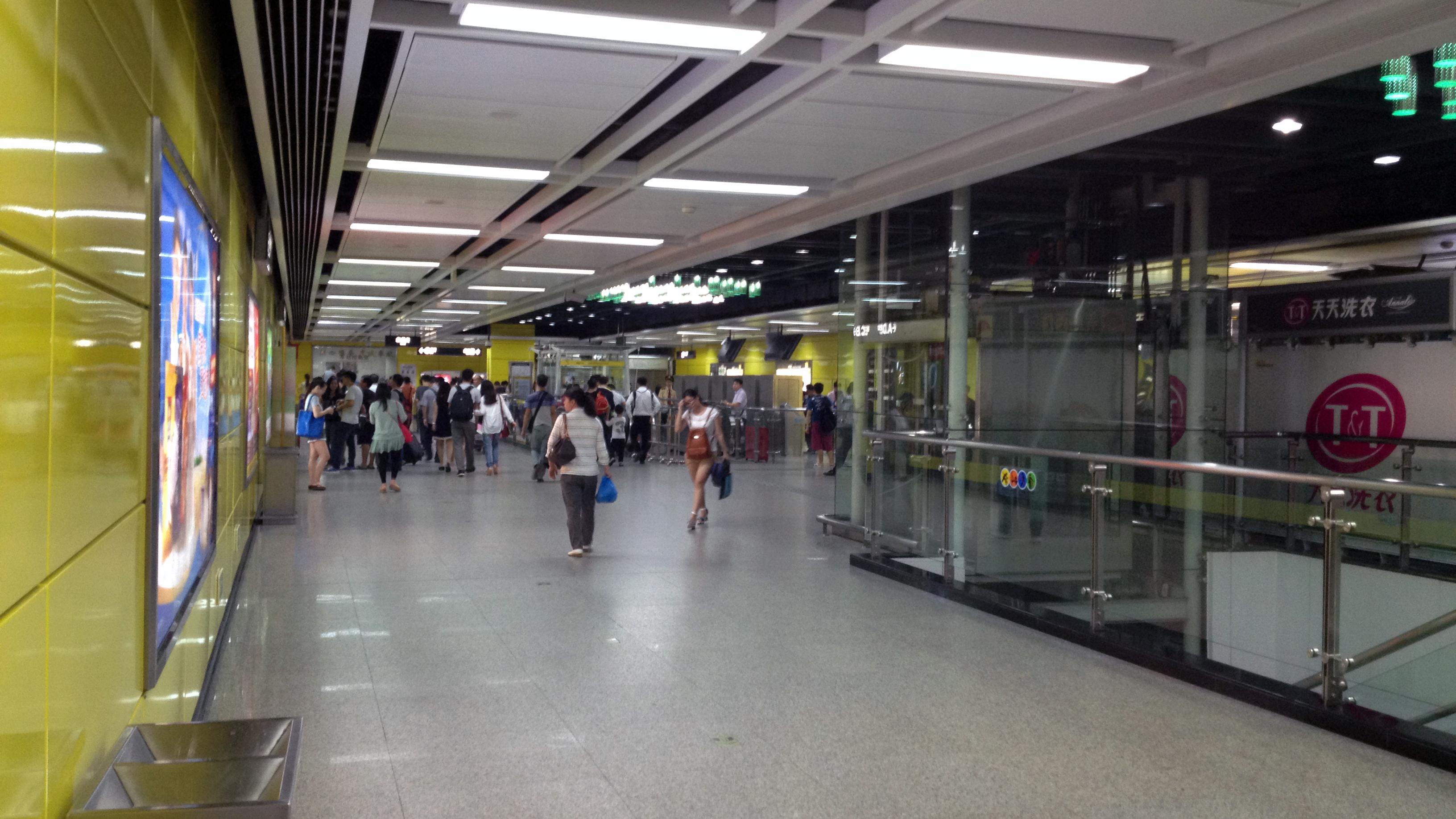 广州地铁市桥站站厅